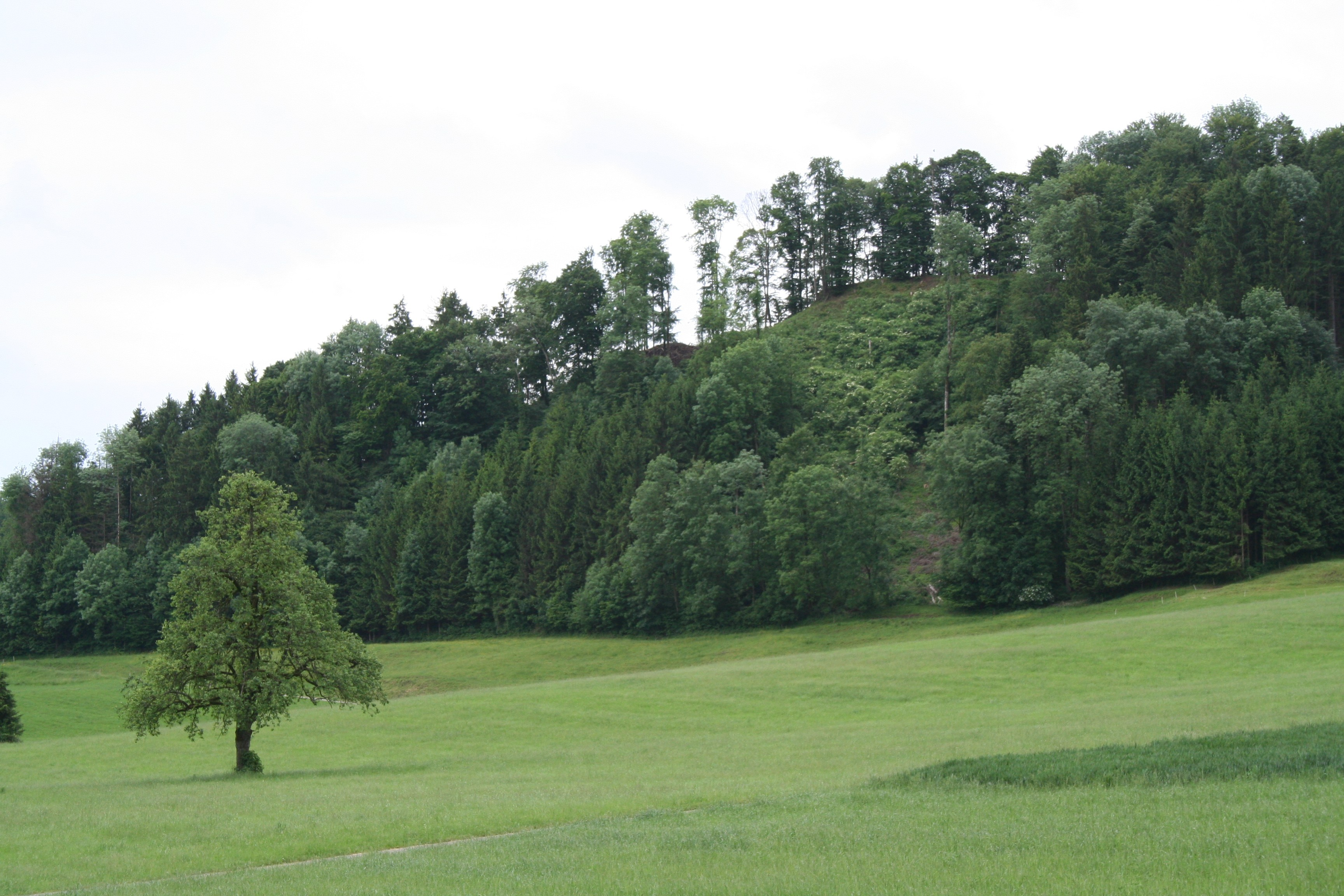 Burghügel der Burg Bichelsee